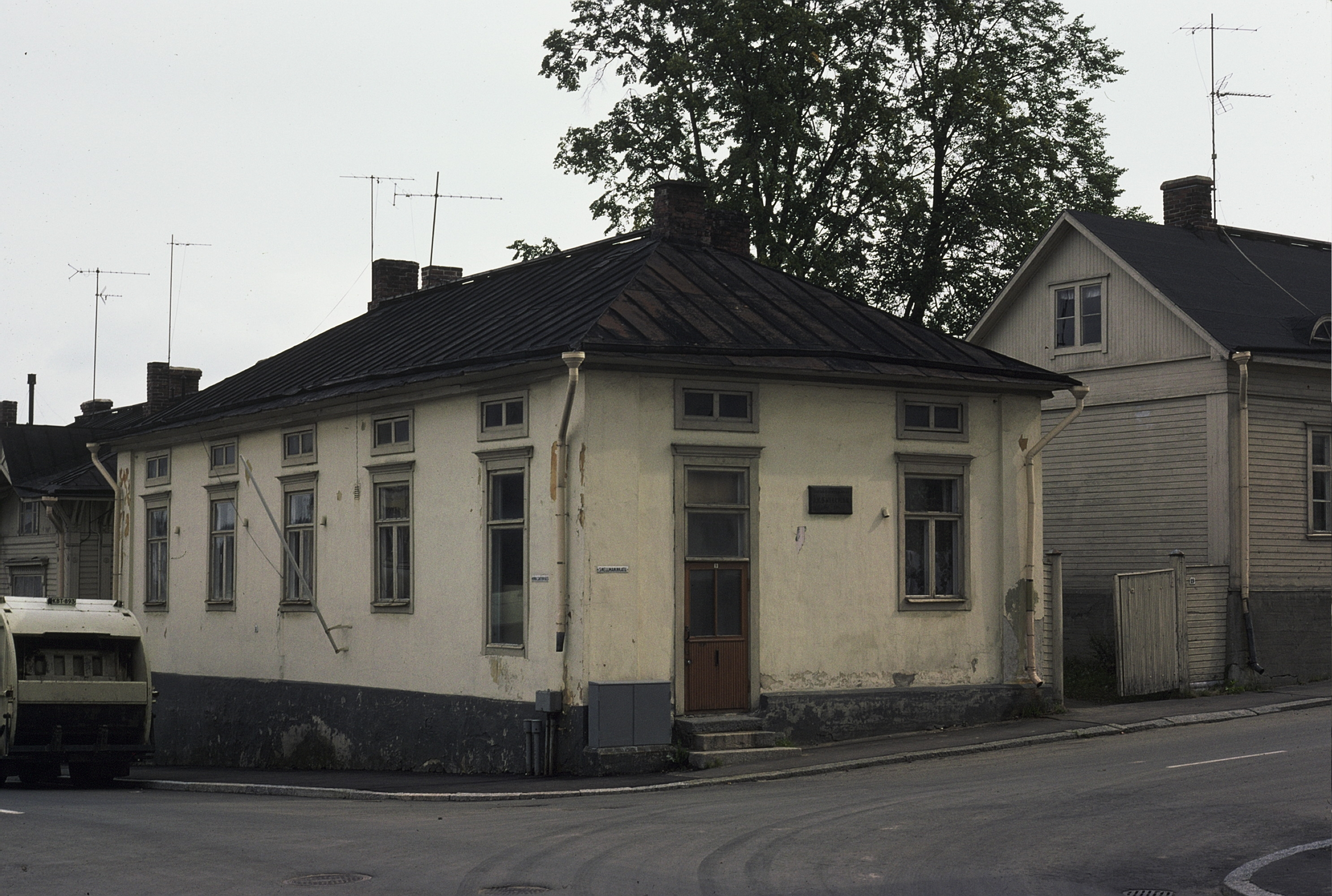 J.V. Snellmanin kotitalo Kuopiossa vuonna 1981. Rakennus oli tuolloin huonokuntoinen ja sen purkamista suunniteltiin. Museovirasto kielsi purkamisen, ja nykyisin rakennus on korjattuna Snellmanin kotimuseona.